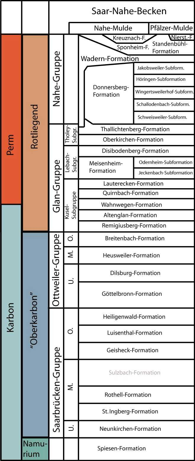 Lithostratigraphie des Permokarbon des Saar-Nahe-Becken, Deutschland